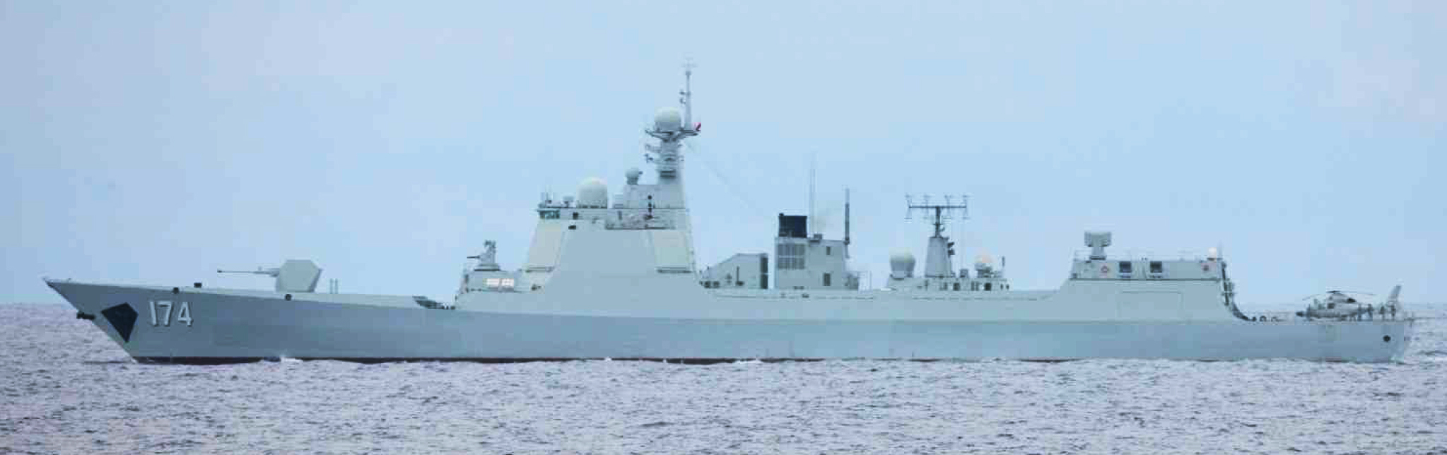 ５月２４日（火）午前９時頃から午後１時頃にかけて海上自衛隊第５護衛隊所属「あきづき」（佐世保）が、与那国島の南約３６０ｋｍの海域を太平洋から南シナ海に向けて西進する中国海軍ルーヤンIII級ミサイル駆逐艦１隻、ルーヤンII級ミサイル駆逐艦１隻、ルーヤンI級ミサイル駆逐艦１隻、ジャンカイII級フリゲート２隻及びフチ級補給艦１隻を確認した。このうちルーヤンIII級ミサイル駆逐艦は、海上自衛隊において初めて確認したものである。なお、これらの当該艦艇が西太平洋において、各種訓練を実施しているのを確認した。